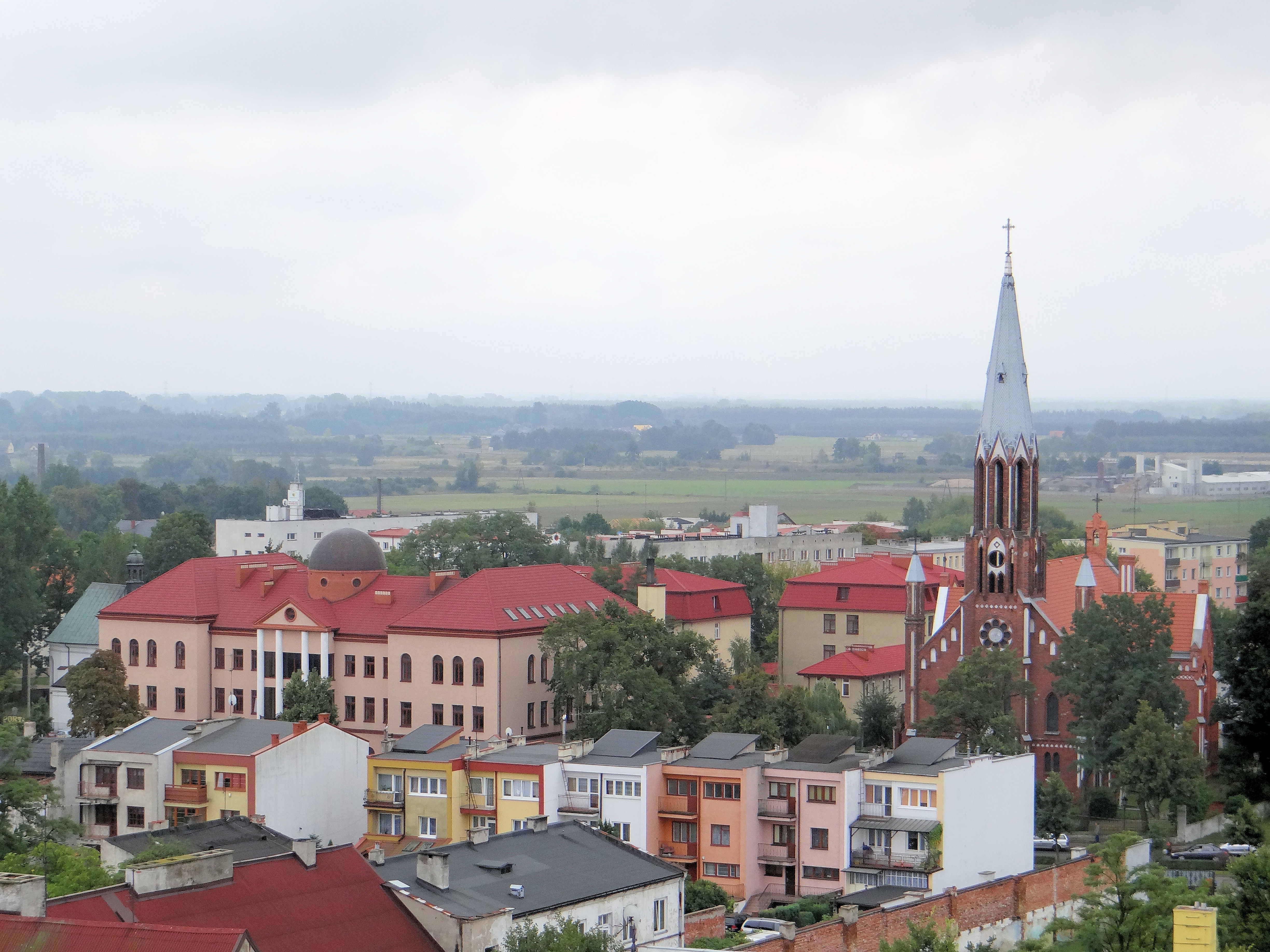 Panorama Łowicza z widokiem na kościół Mariawitów